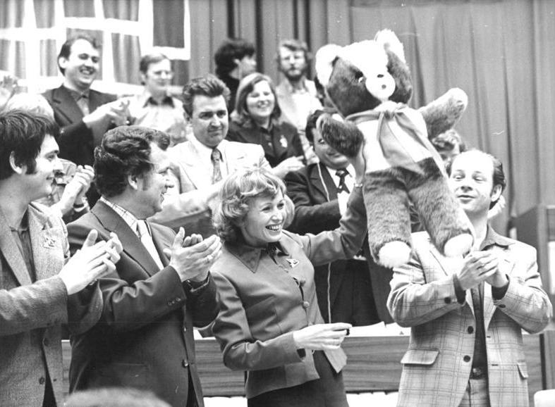 ADN-ZB-Koard 5.6.76- Berlin: X. Parlament- 5. Beratungstag. Herzlicher Glückwunsch zur Wahl von Helga Labs (3.v.l.) zum Vorsitzenden der Pionierorganisation "Ernst Thälmann" und zum Sekretär des Zentralrates der FDJ. Links: Hartmut König, 2.v.l.: Dusan Ulcak, Präsident des Internationalen Studentenbundes, r.: Wolfgang Herger. Protokoll, Titel und Funktionen siehe ADN-Meldung.